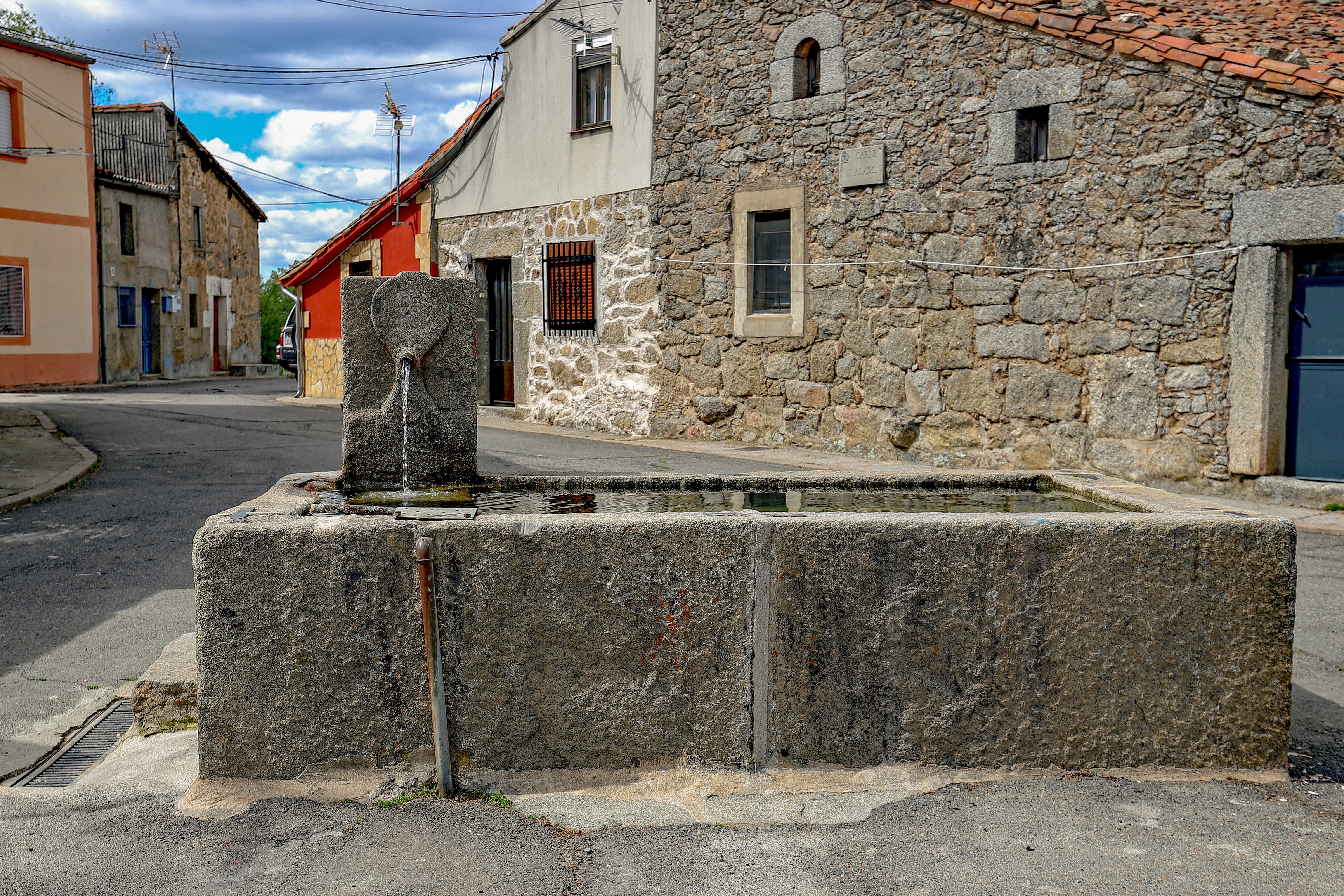 Fuentebuena es una localidad que pertenece al municipio de Béjar, en la provincia de Salamanca.